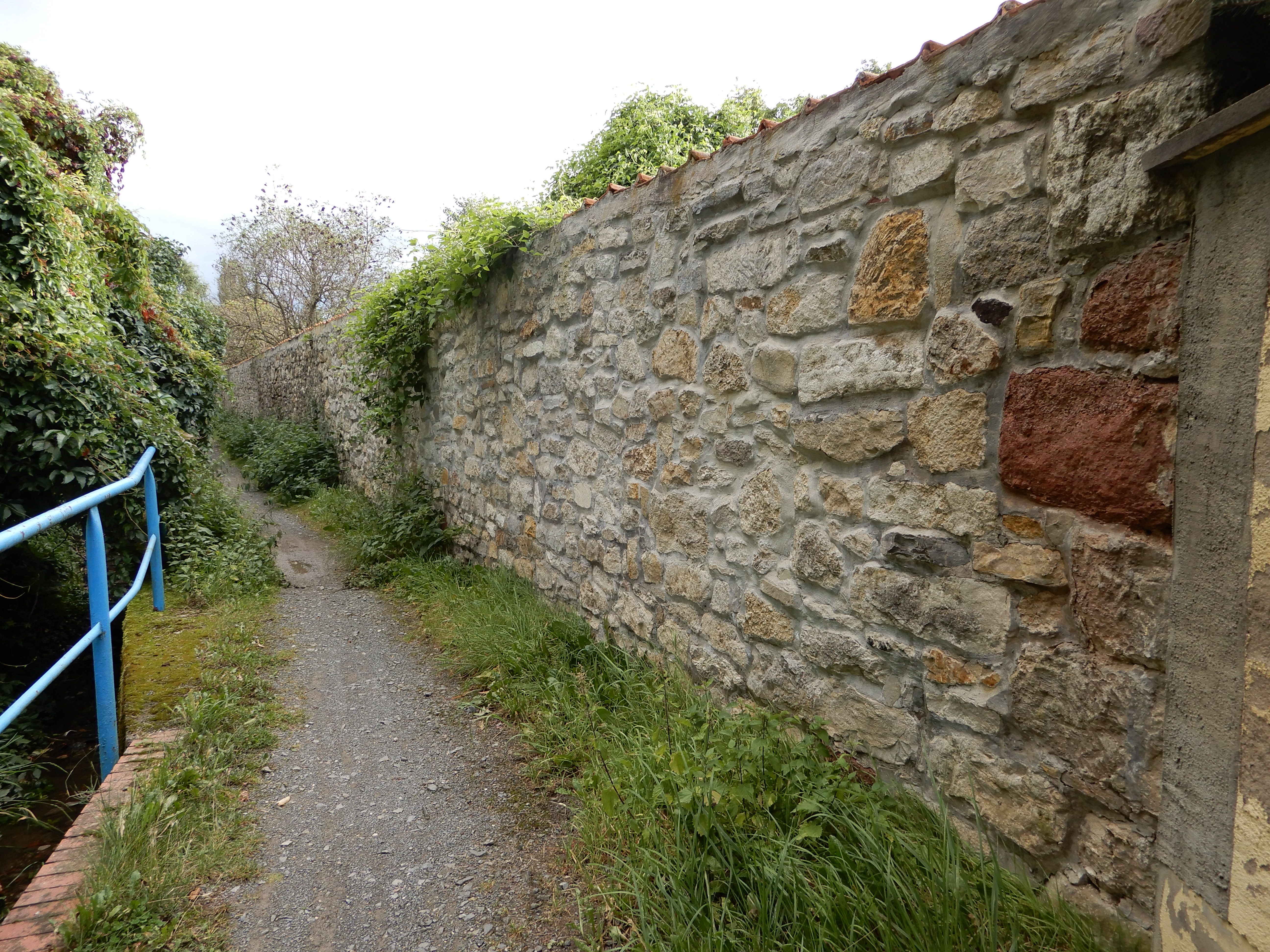 Teil der Stadtmauer in der Distelgasse in Ermsleben